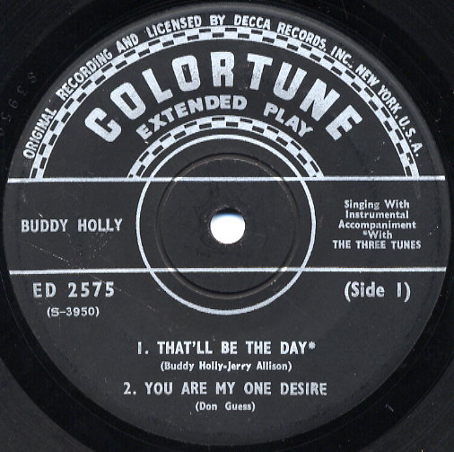 Es una foto del primer lado del Ep That ll be the day, con las canciones: "That'll Be the Day", "You Are My One Desire"/ "Ting-A-Ling" y "Blue Days y Black Nights". No saque una foto del otro lado del EP, porque la etiqueta esta destruida del otro lado.